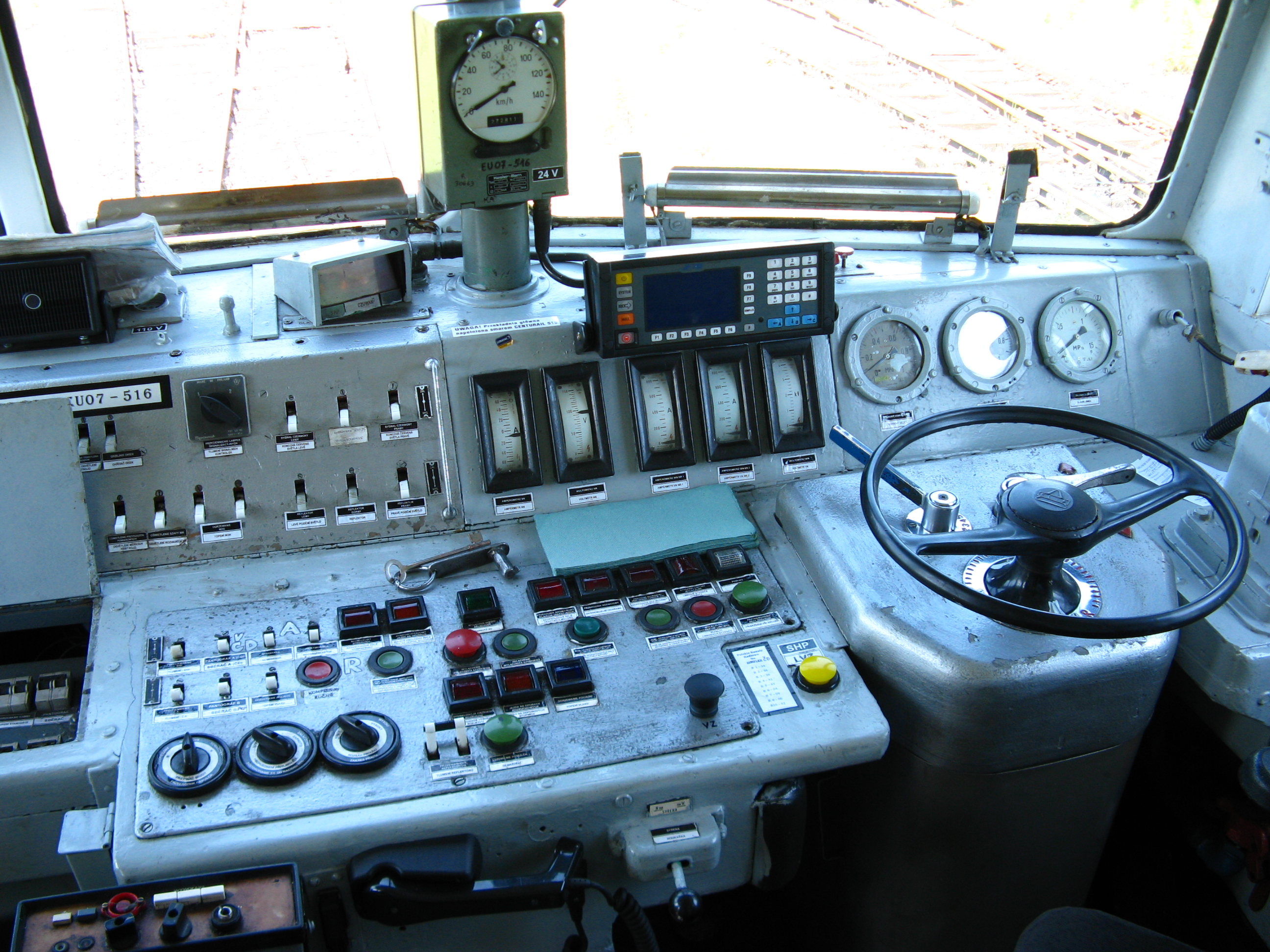 Lokomotiva polské společnosti PKP InterCity, EU07-516 "Markétka" zajíždějící na české tratě. Stanoviště strojvedoucího